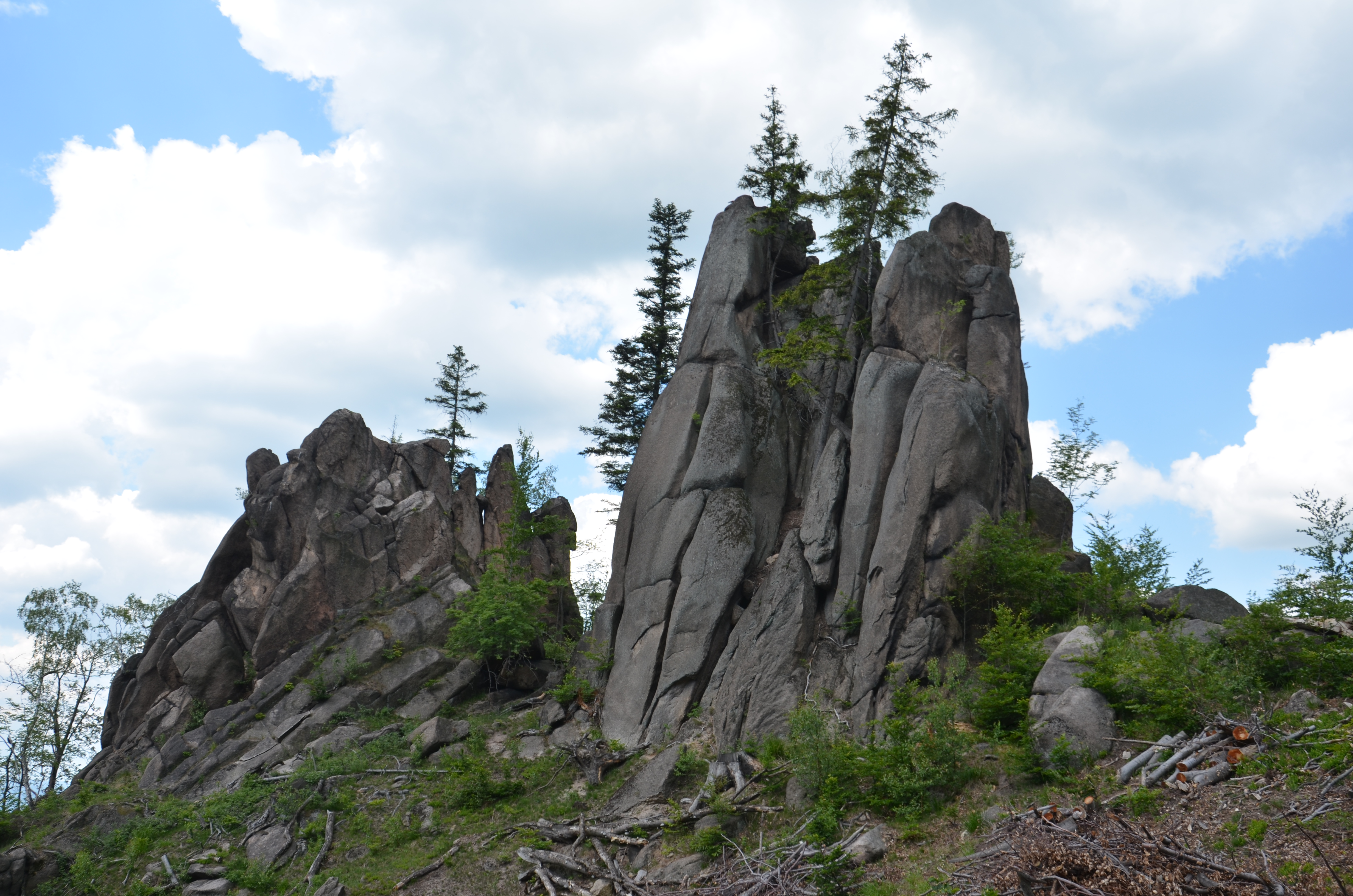 Strużnicka Baszta